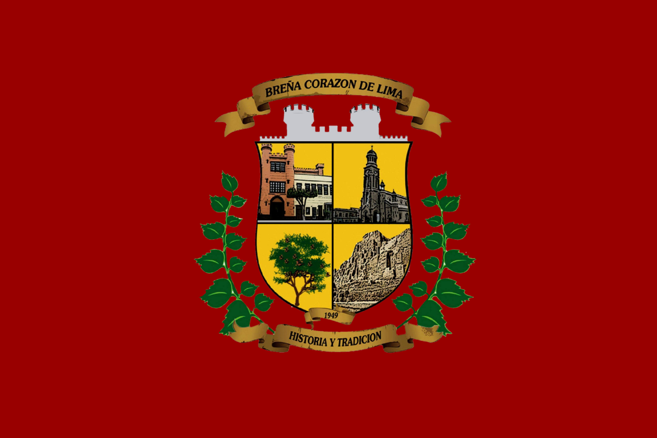 Bandera del distrito de Breña, Lima